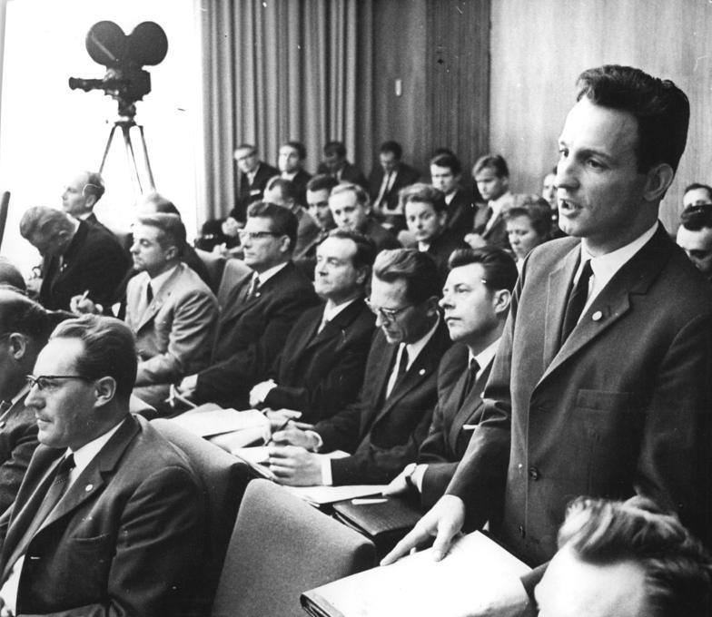 Zentralbild Junge 20.9.1968 Bgm-zie Berlin: 11. Sitzung des Staatsrates der DDR am 20.9.68. Der Staatsrat der DDR trat am 20.9.68 unter Vorsitz von Walter Ulbricht zu seiner 11. Sitzung zusammen. Im Mittelpunkt der Beratung im Amtssitz des Staatsrates am Marx-Engels-Platz steht ein Beschlußentwurf über "Die Aufgaben der Körperkultur und des Sports bei der Gesatlung des entwickelten gesellschaftlichen Systems des Sozialismus in der DDR". Auf unserem Foto: Thomas Köhler, Olympiasieger im Rennschlittensport und Verbandstrainer des Deutschen Schlitten- und Bobsport-Verbandes der DDR (r.), spricht in der Diskussion zum Beschlußentwurf.